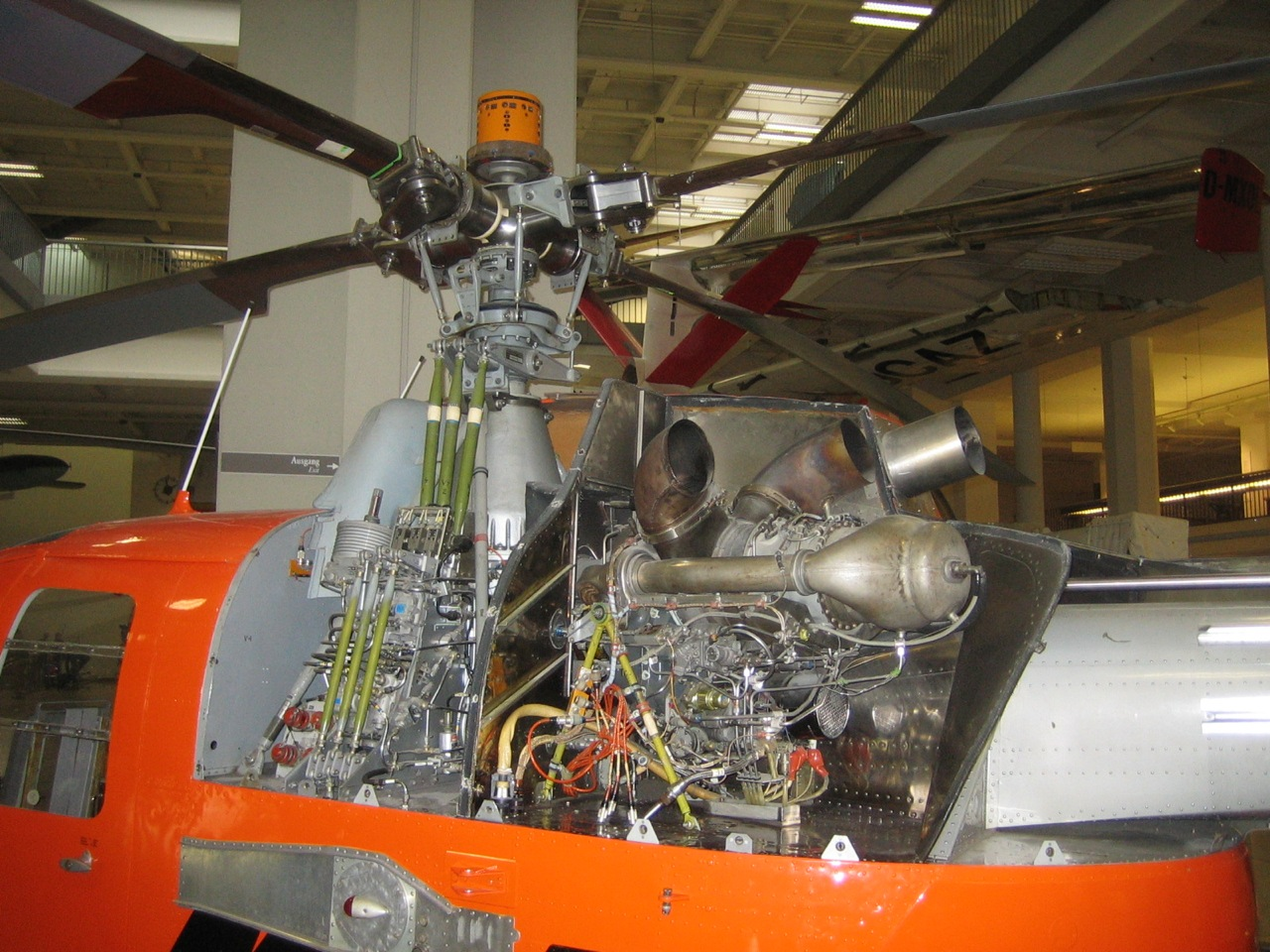 MBB BO105 engine displayed at Deutschen Museum, Munich